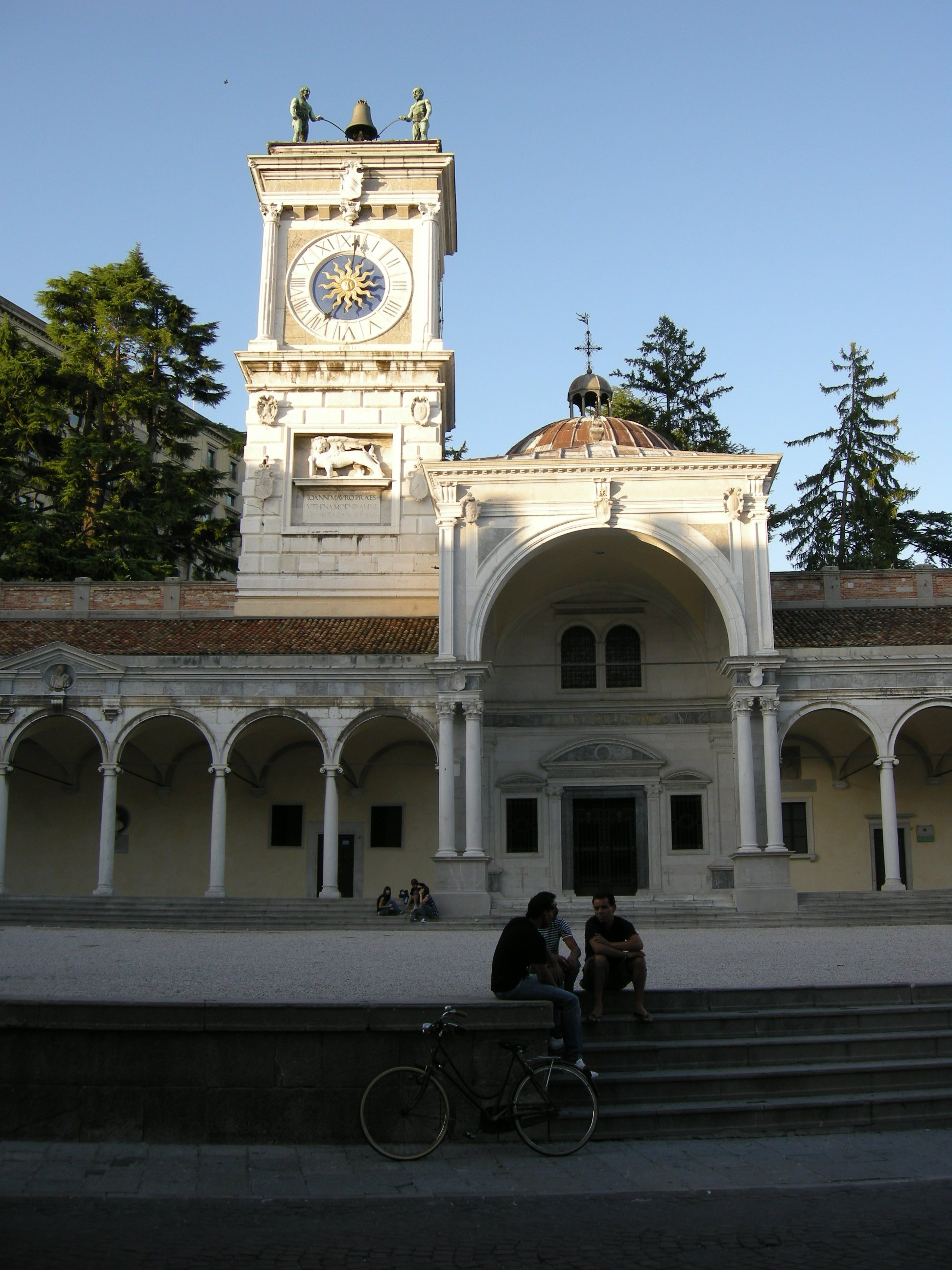 Udine, piazza della libertà, torre dell'orologio